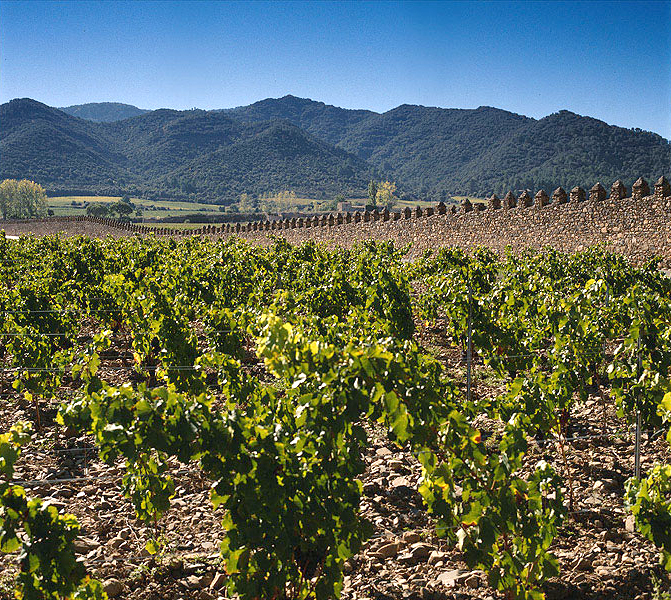 Viñedo Grans Muralles